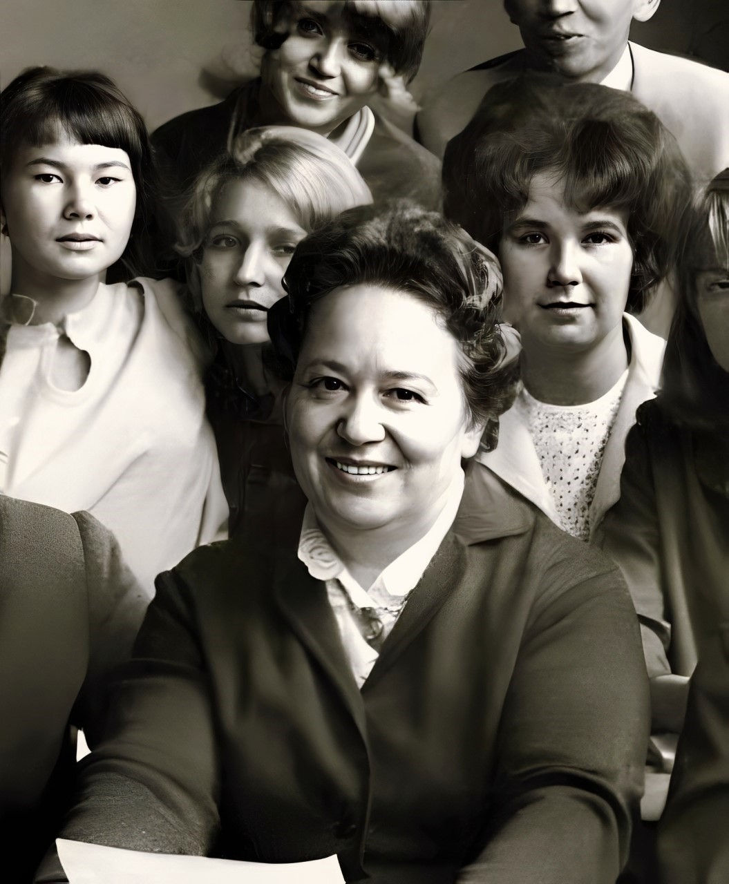 Воеводина Надежда Павловна (1919-1976), доцент Московского текстильного института.